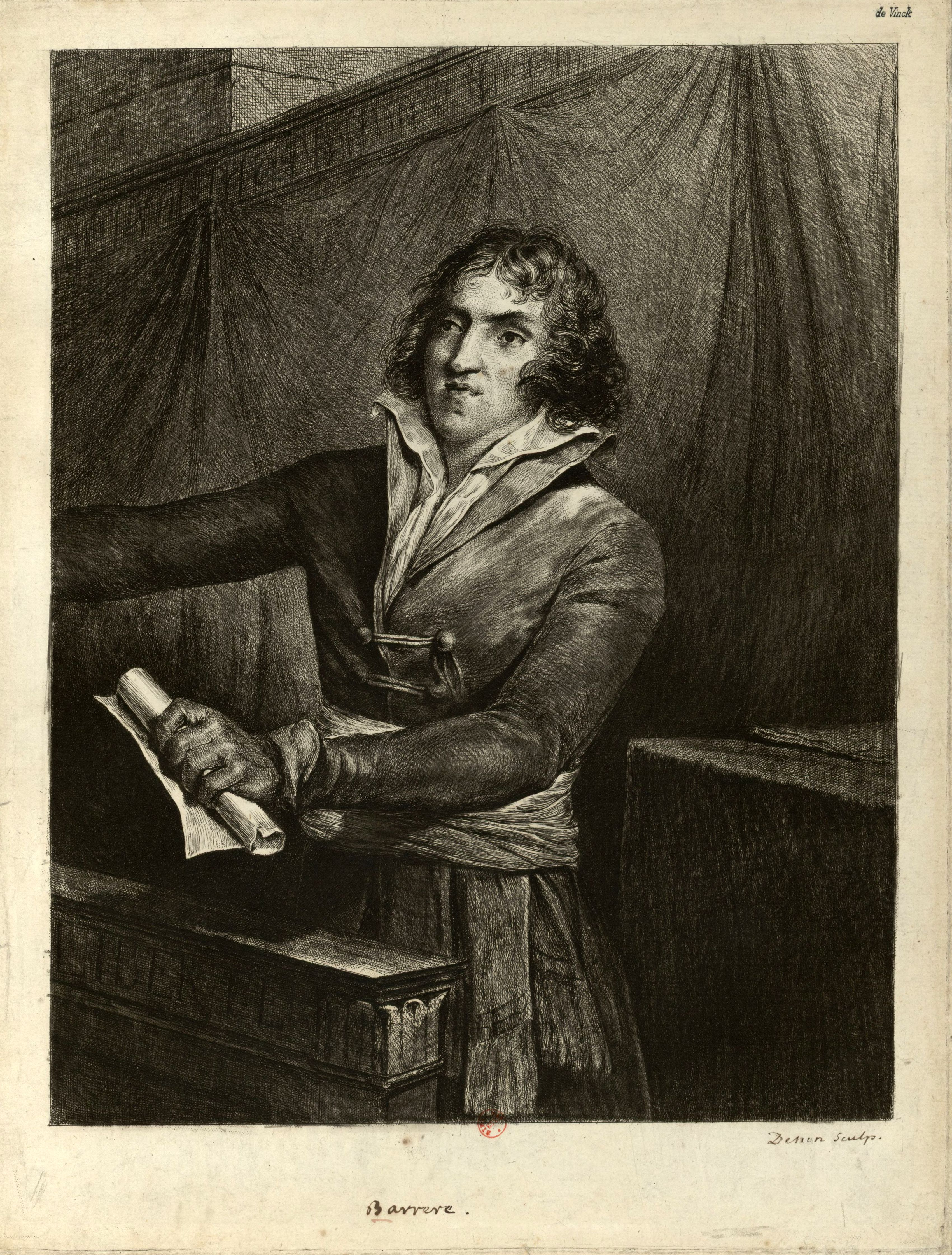 Barère à la tribune, avec la ceinture tricolore, et un rouleau dans la main gauche, estampe.